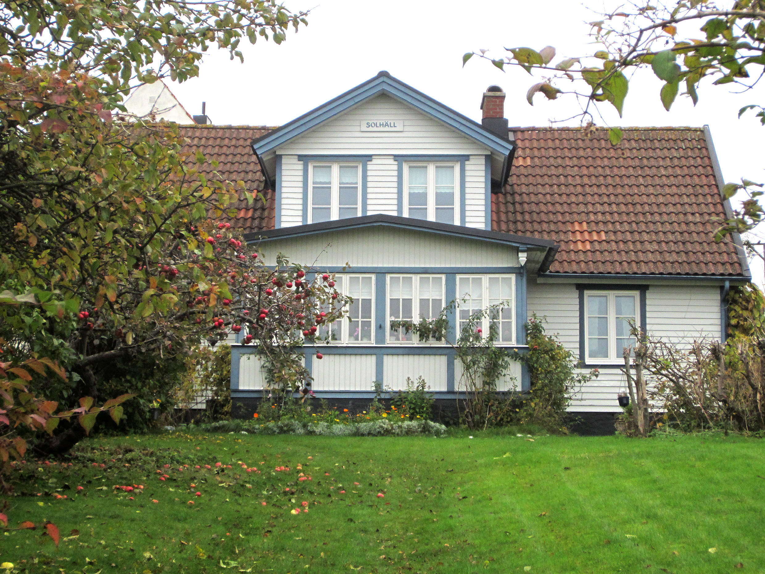 Äldre sommarvilla i Skälderviken, Sweden.